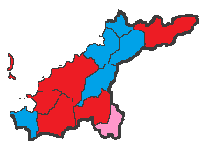 Alcaldes de la Comarca de Vigo.